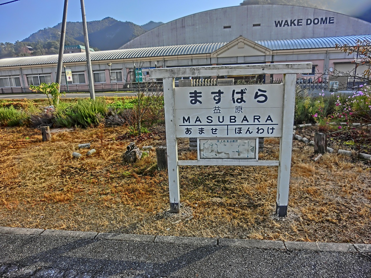 岡山県道703号備前柵原自転車道線 旧同和鉱業片上鉄道 岡山県 増原駅の駅標